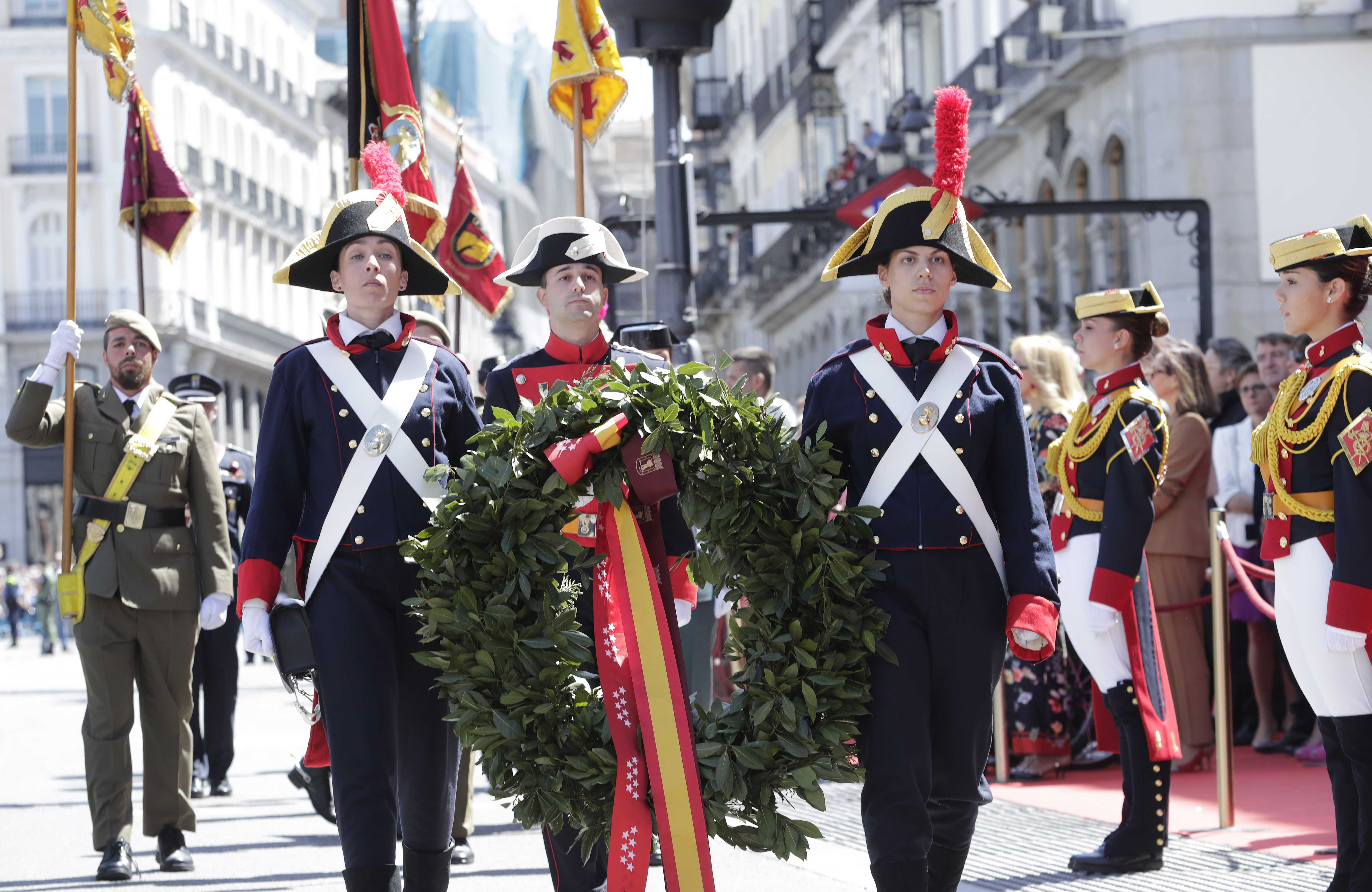 Parada militar que ha tenido lugar ante la Real Casa de Correos, con la que se ha rendido homenaje a todos los que dieron su vida por España. Durante el acto, se han colocado sendas coronas de laurel en las lápidas que recuerdan a los Héroes del 2 de mayo de 1808 y a las víctimas de los atentados del 11 de marzo de 2004, situadas en la fachada de la sede del Gobierno regional.